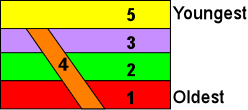 ภาพแสดงความสัมพันธ์ที่ตัดกันของชั้นหิน โดยตัวเลขแสดงลำดับการเกิดของชั้นหินแต่ละชั้น